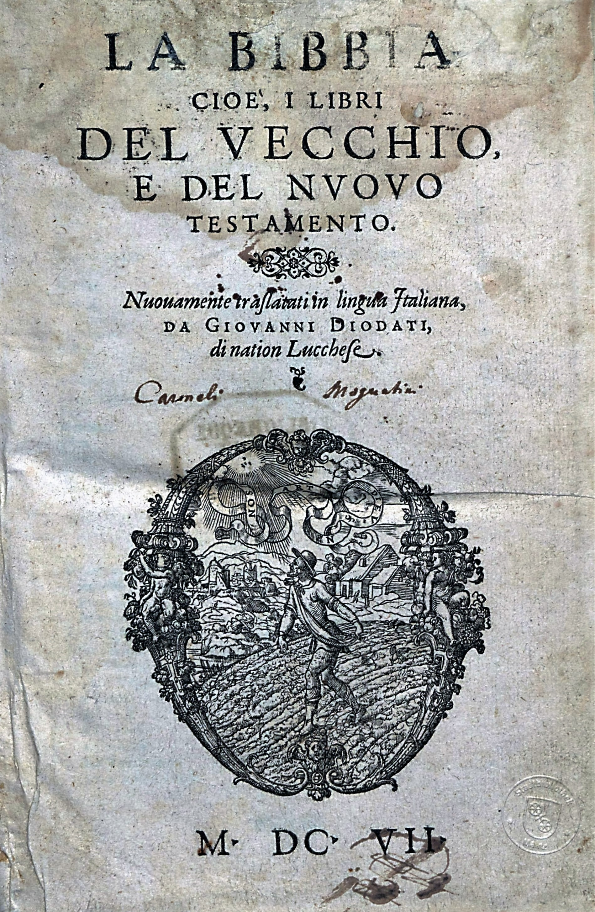 La Bibbia : Cioè, I Libri Del Vecchio, E Del Nuovo Testamento ; Nuovamente traslatati in lingua Jtaliana / Da Giovanni Diodati. [Genf] : Tournes, 1607. Drucker: Jean de Turnes (1539 - 1615) Drucker ermittelt aufgrund der Druckermarke (Sämann mit Motto "SON ART EN DIEV") ermittelt. Titelblatt des Exemplars der Wissenschaftlichen Stadtbibliothek Mainz. Signatur: XIVa:4°/24 (Rarum) Fingerprint: i3i5 a,di l-e, ioEu 3 1607R